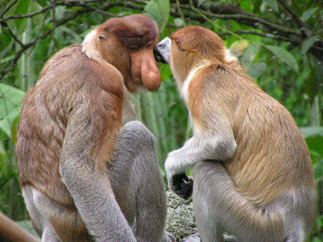 Nasalis larvatus